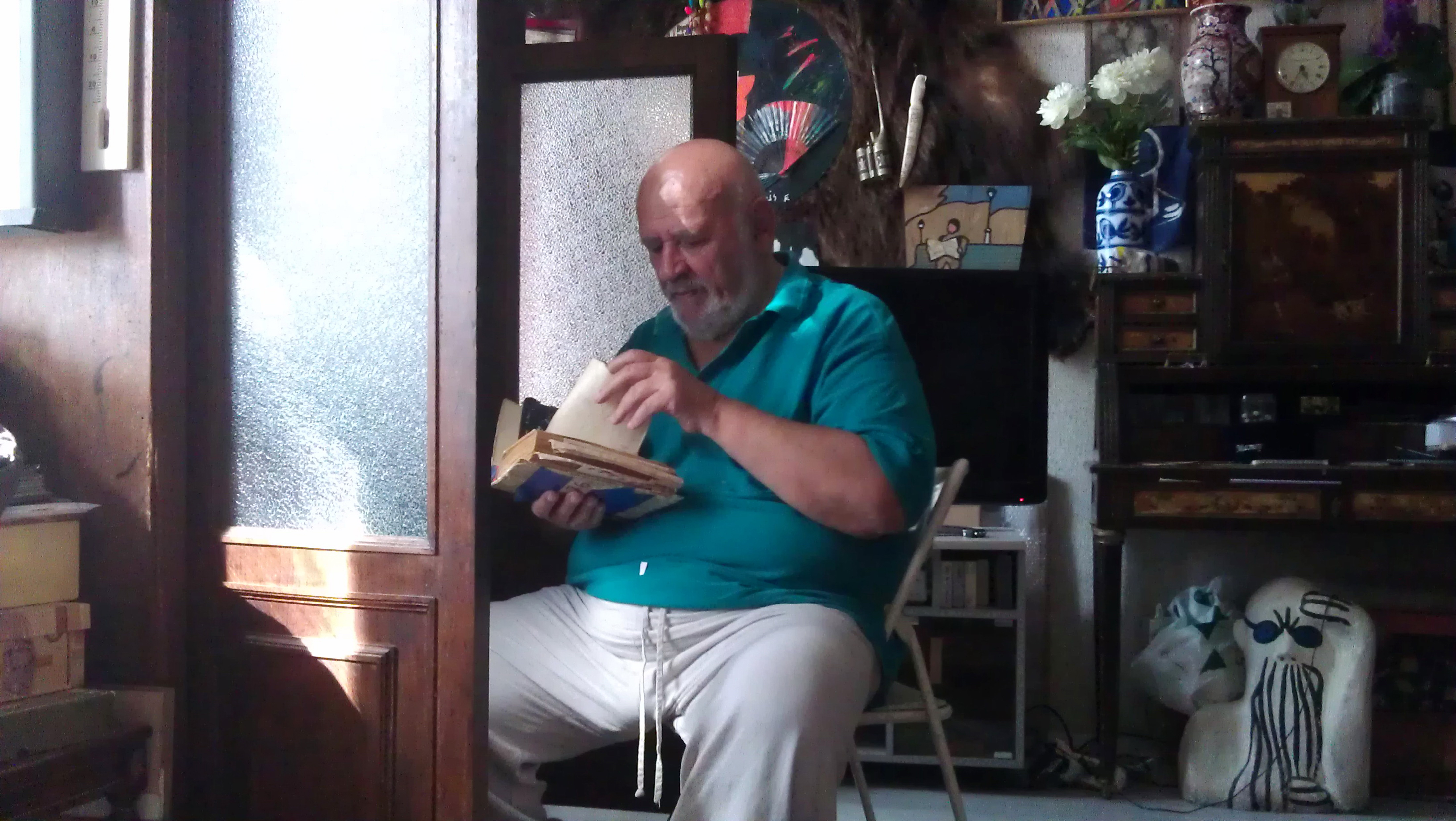 Гага Ковенчук в своей квартире на канале Грибоедова.